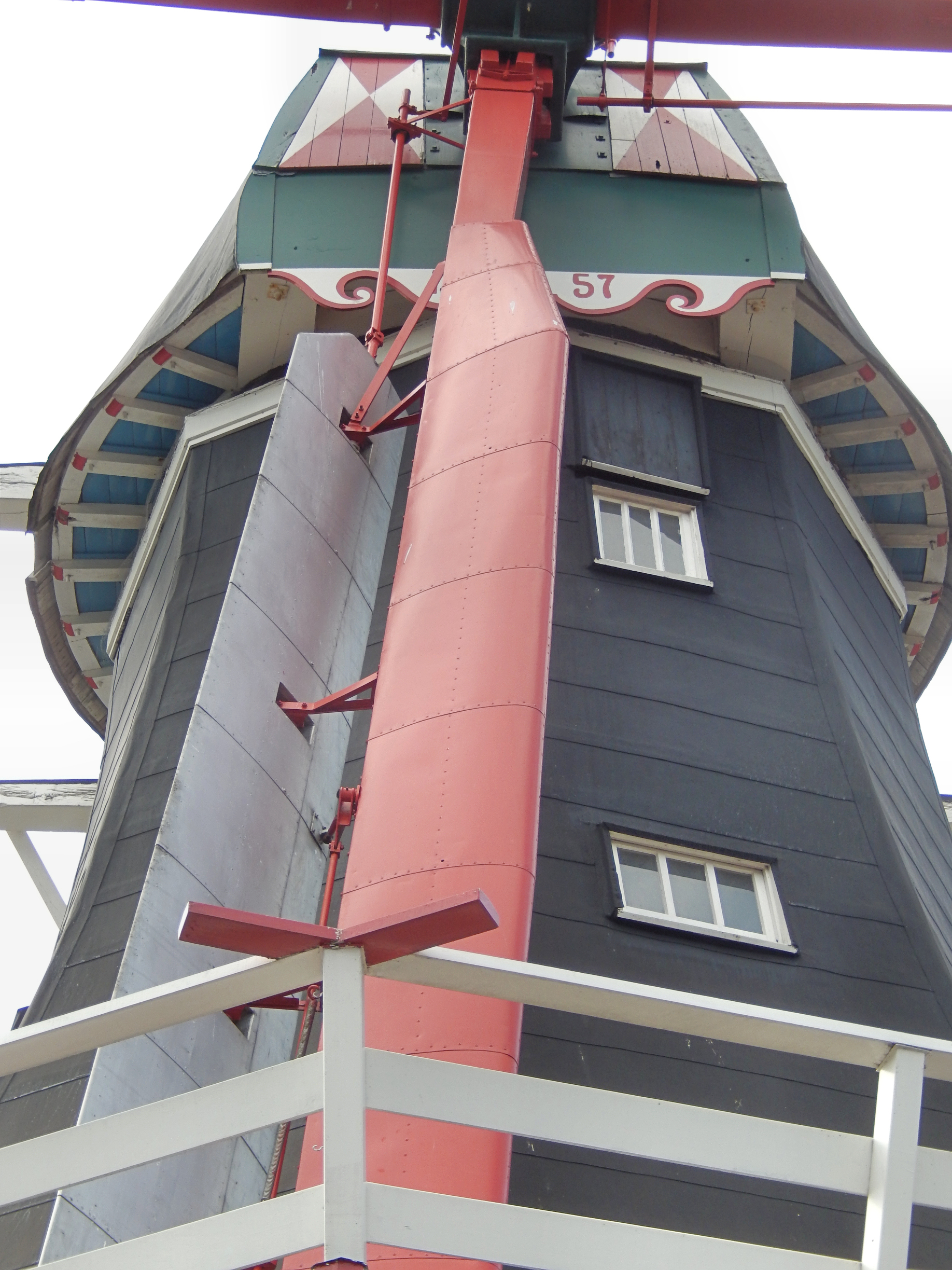 De Hoop, Norg, Bilau wieken